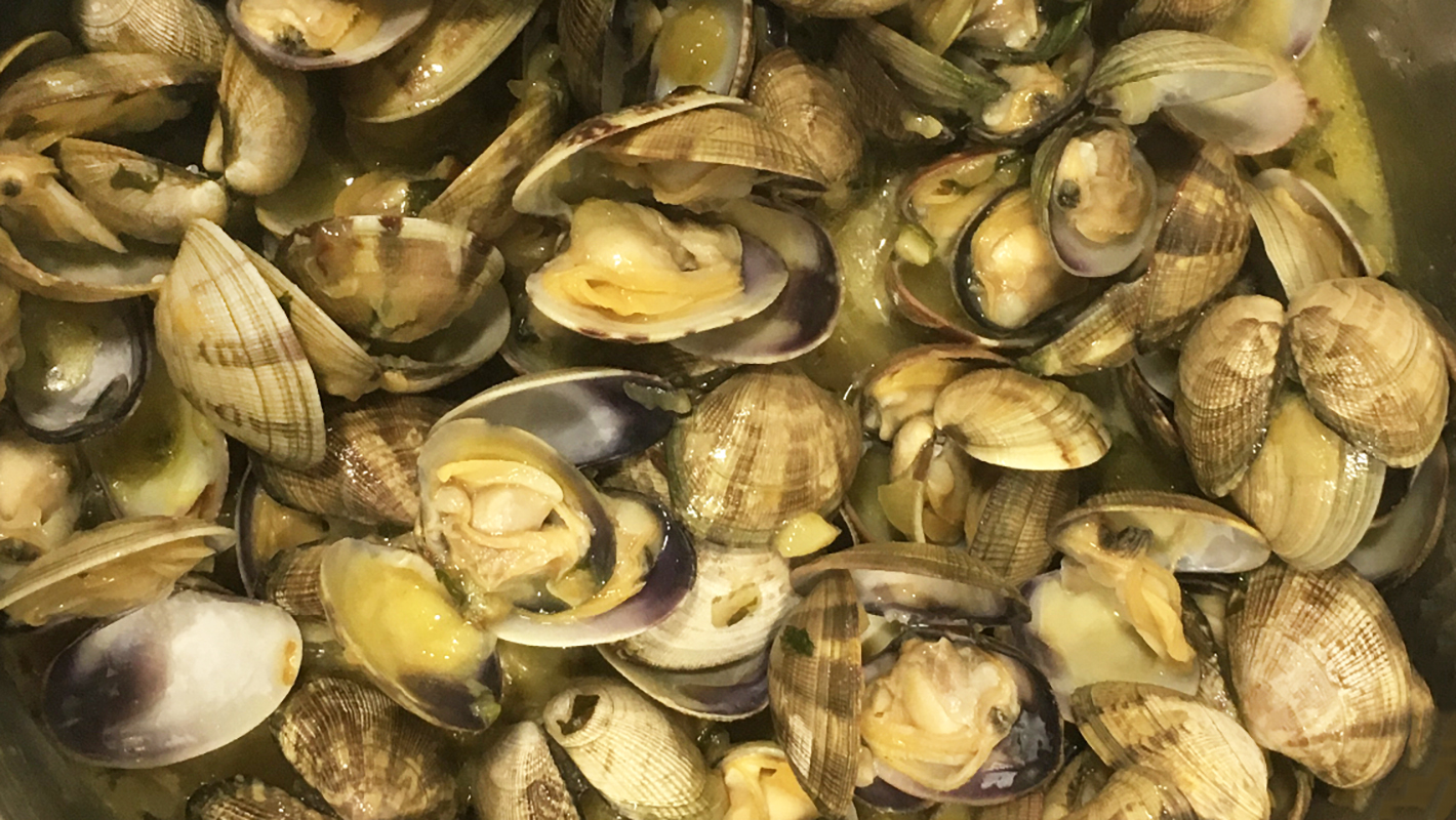 Amasueles, almejas, gastronomía